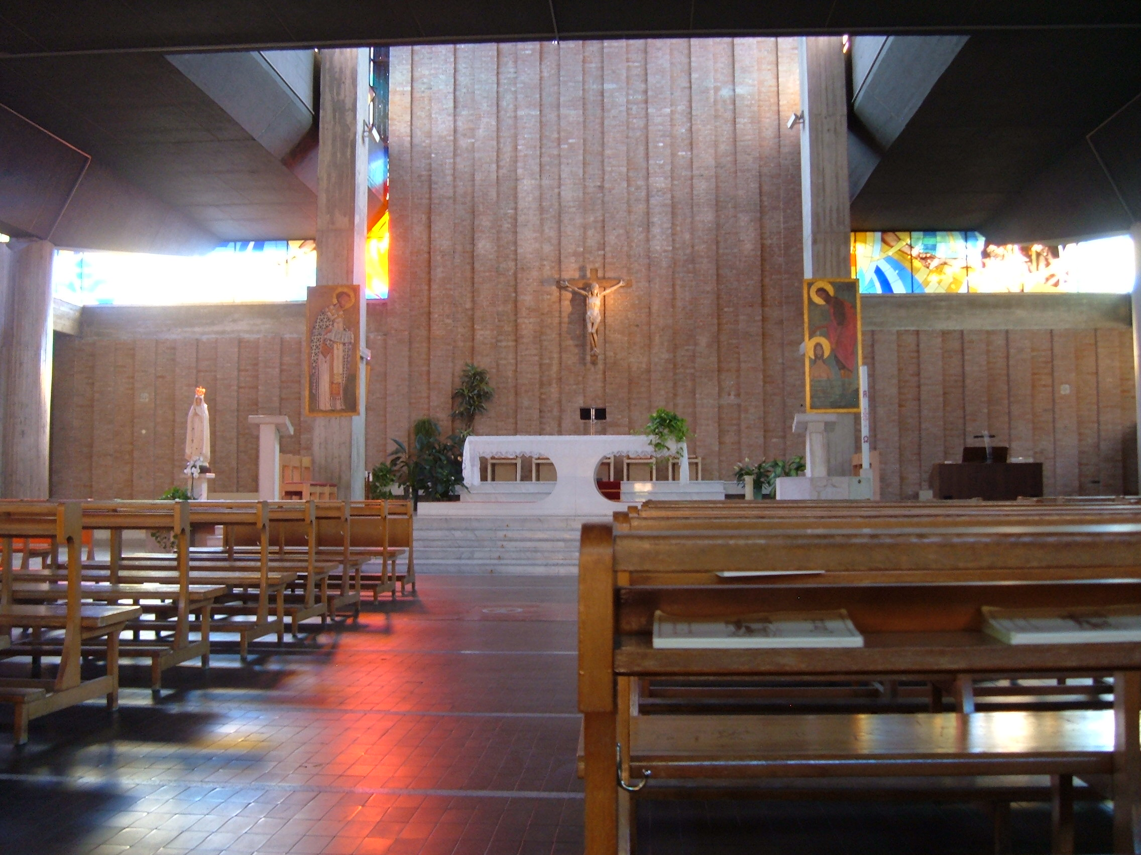 Chiesa parrocchiale di San Giovanni Crisostomo, a Roma, nel quartiere Monte Sacro Alto, in via Emilio De Marchi. Sulla parete di fondo il crocifisso in terracotta realizzato negli anni Settanta. Dello stesso autore (ignoto) le formelle anch'esse in terracotta poste sui lati della navata centrale raffiguranti le stazioni della Via Crucis. Sui pilastri ai lati dell'altare le due pale policrome realizzate dell'artista Mauro Magni raffiguranti San Giovanni Crisostomo e il Battesimo di Gesù con San Giovanni Battista. In alto, sullo sfondo, le moderne vetrate policrome realizzate negli anni Duemila in sostituzione delle vetrate facenti parte del progetto architettonico originale, di natura più geometrica-astratta e dipinte a freddo sui toni del nero e del rosso rubino.